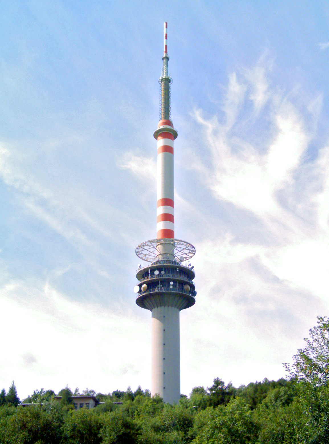 vysílač Buková hora